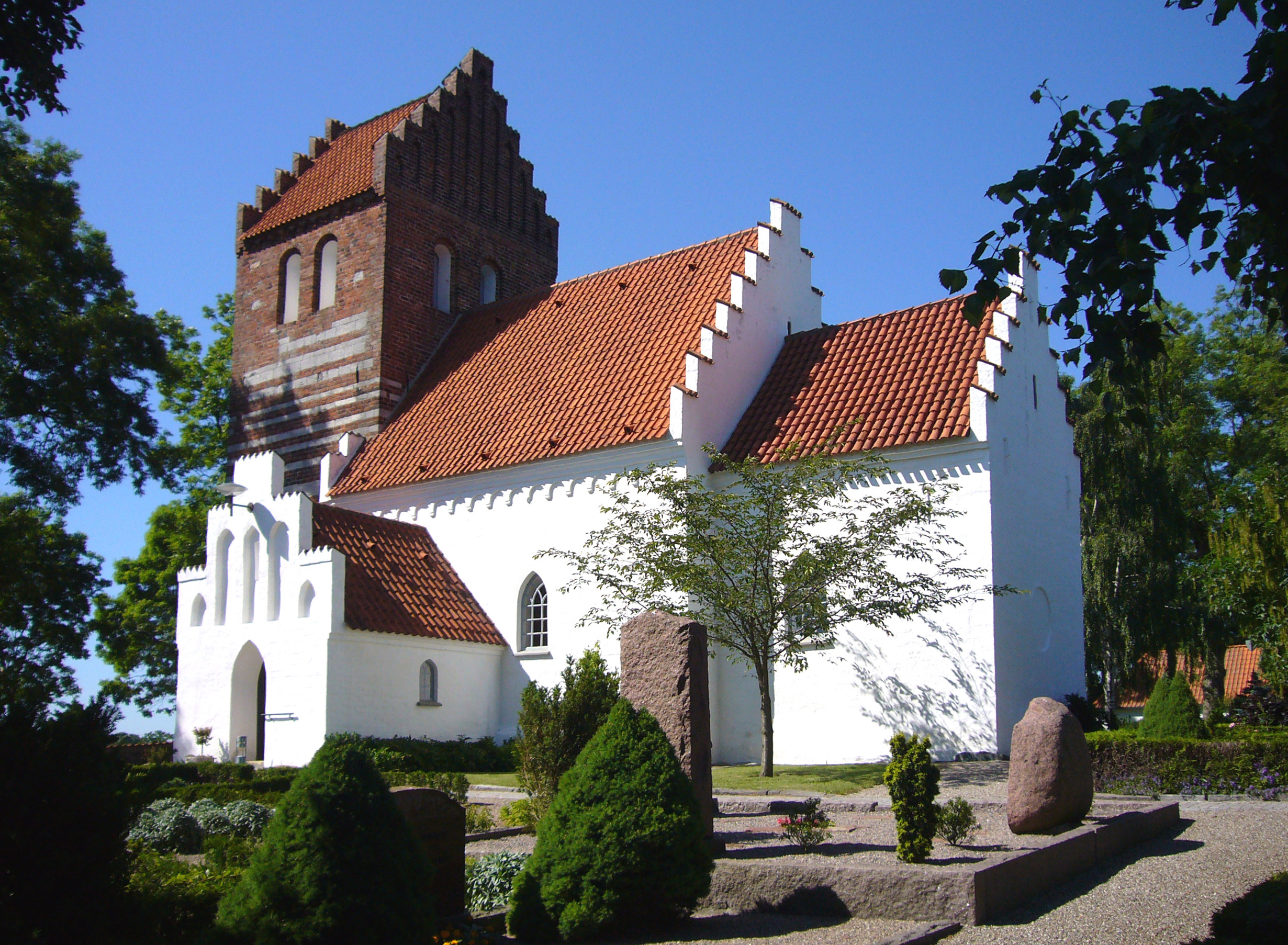 Karlstrup Kirke, Roskilde County, Denmark.